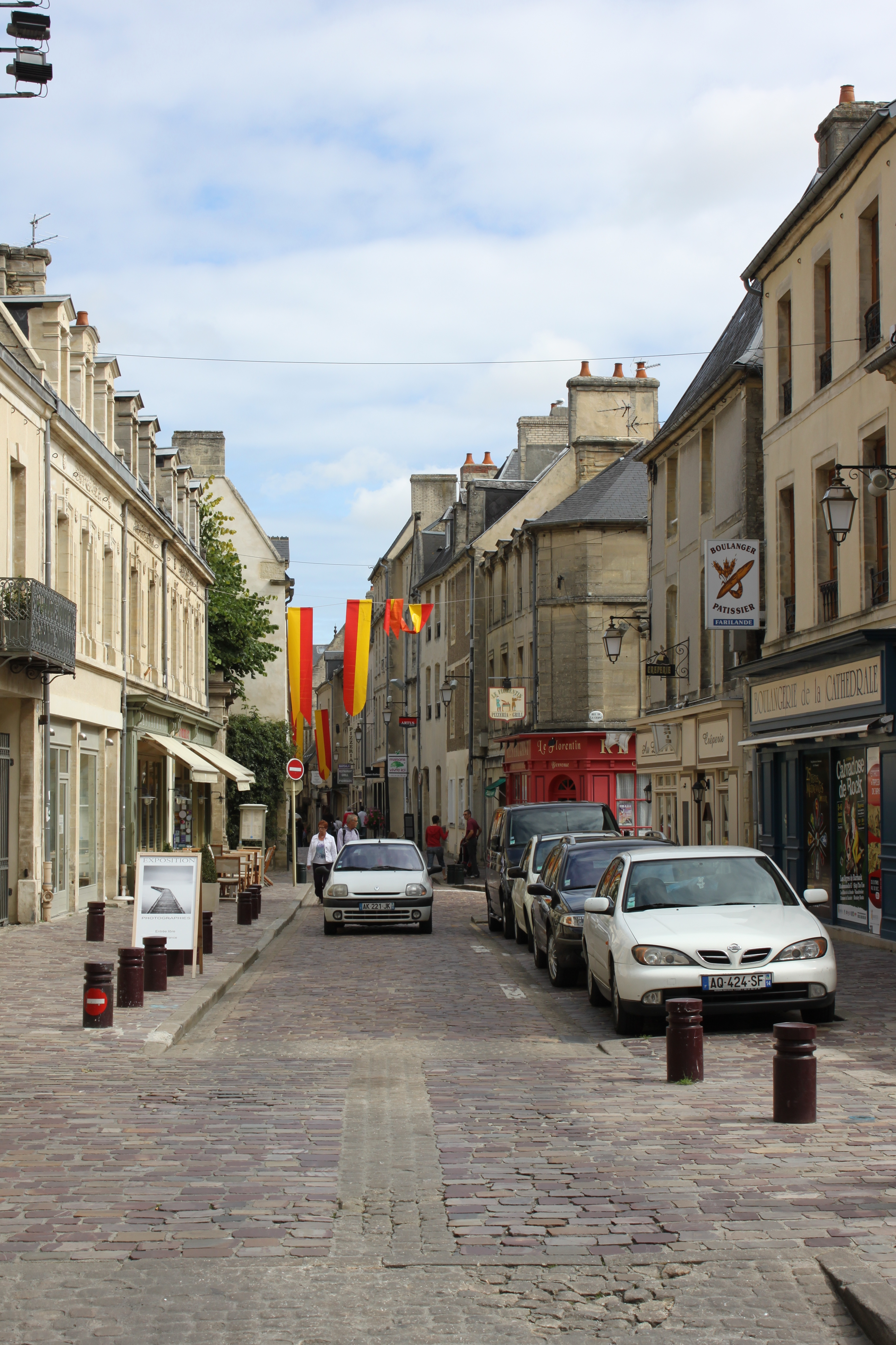 Altstadt von Bayeux, Normandie